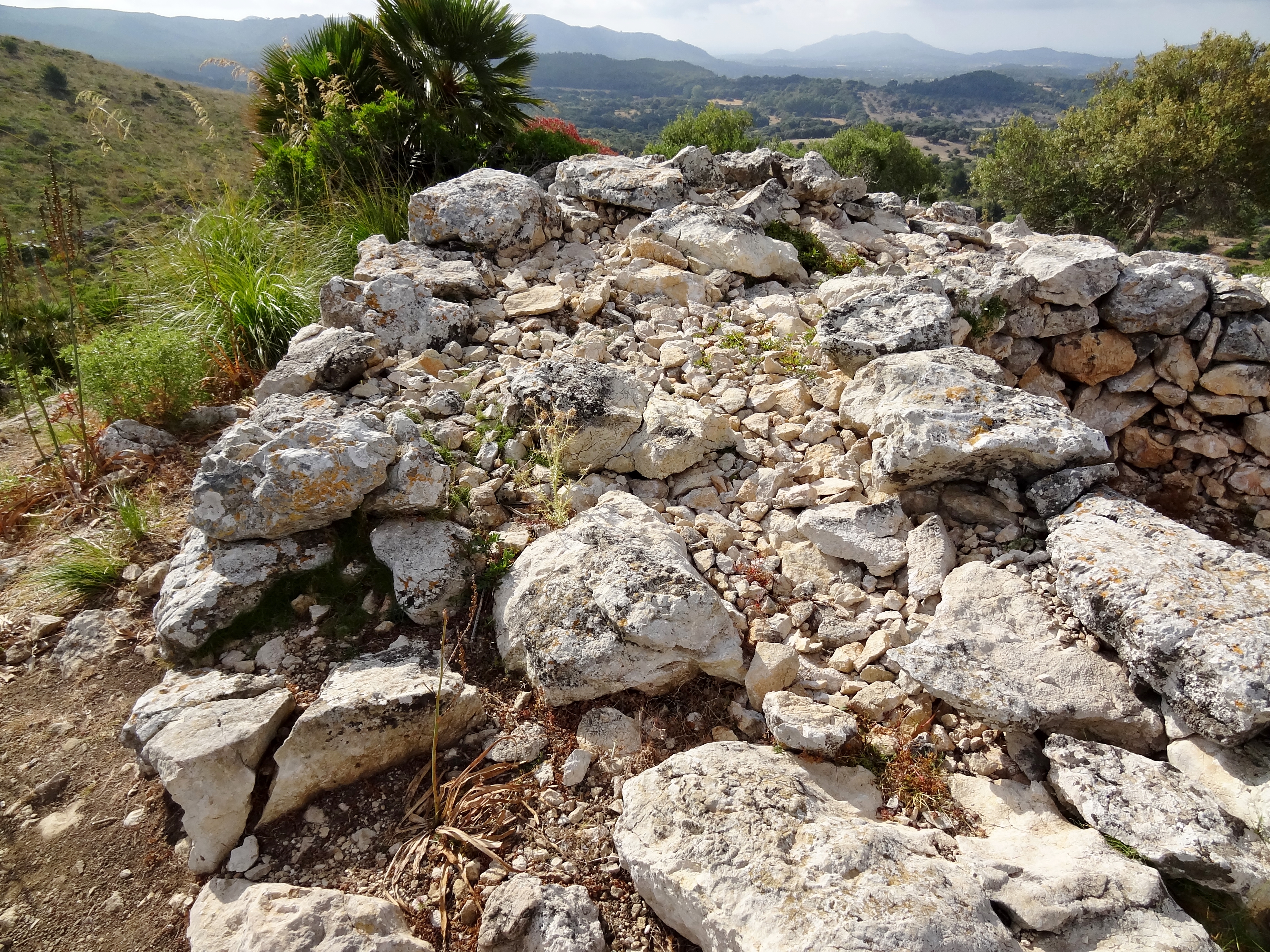 Talaiot auf dem Puig Figuer, Gemeinde Artà, Mallorca, Spanien